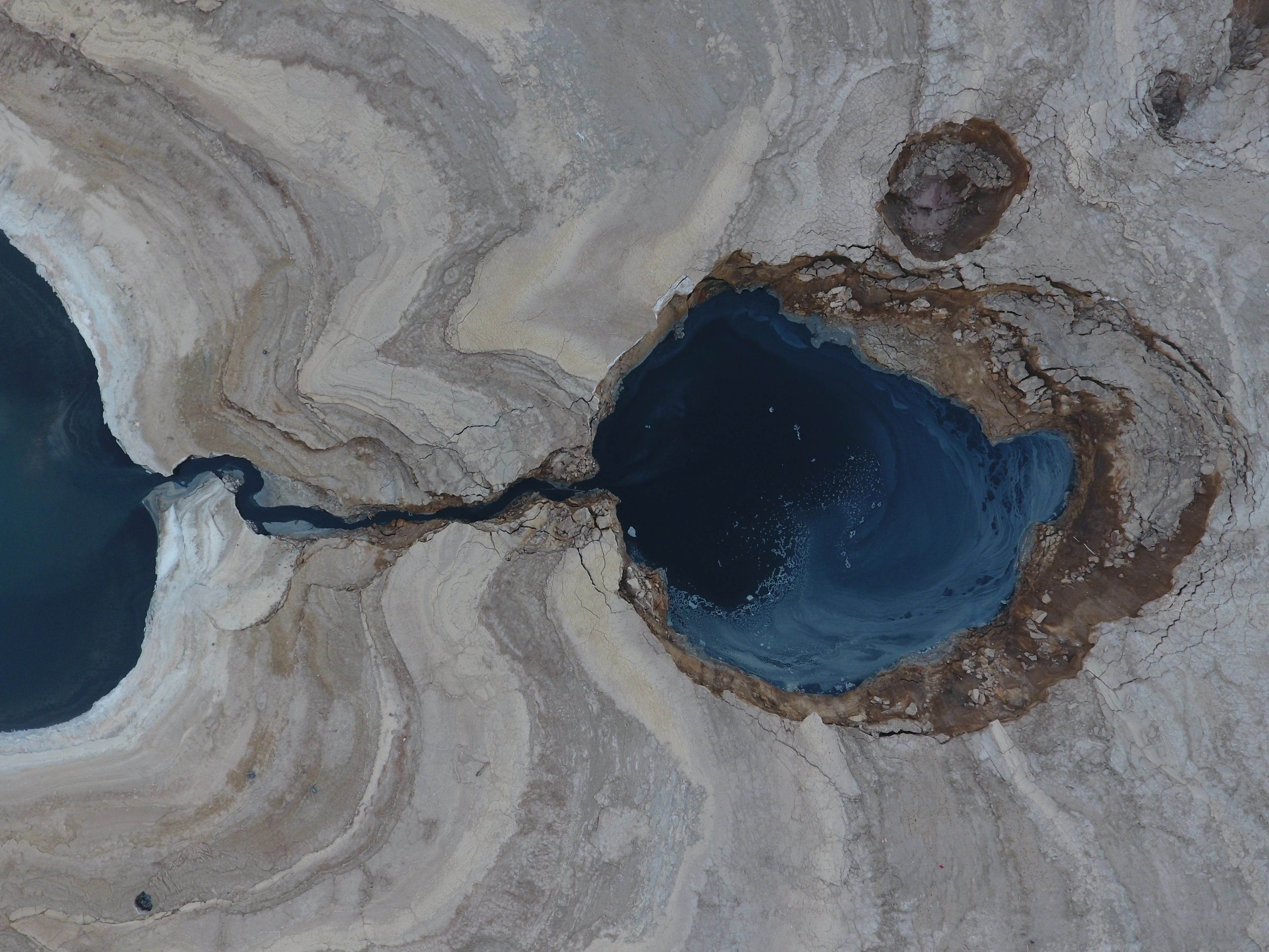 בולען יפיפה אשר בקע בלב שמורת עין גדי והולך ומתחבר לים המלח תוך חשיפת שכבות הסלע. מראה הבולען כל כך יפה עד שאנחנו שוכחים את האיום שהוא מביא עמו לשמורת הטבע הייחודית. הבולען המחקה בצורתו את ים המלח המתחבר לכנרת ונדמה כי מצולם מלווין